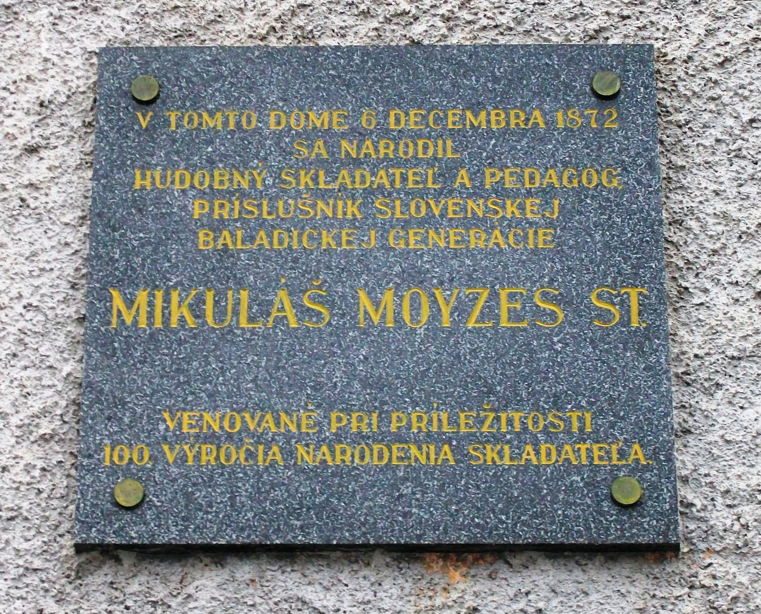 Pamätná tabuľa na rodnom dome hudobného skladateľa Mikuláša Moyzesa st. odhalená pri príležitosti 100. výročia jeho narodenia. (6.12 1872) - (kultúrna pamiatka) This medium shows the protected monument with the number 611-11390/2 in the Slovak Republic.